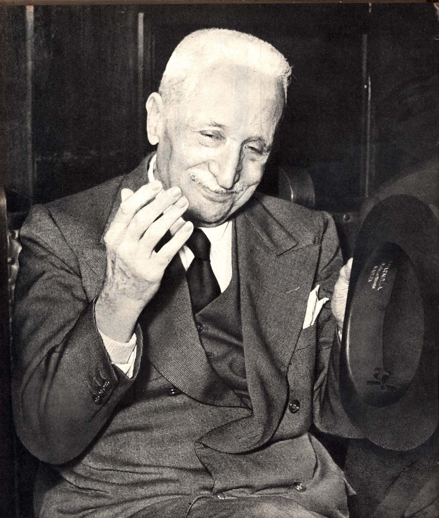 Italian politician Enrico De Nicola